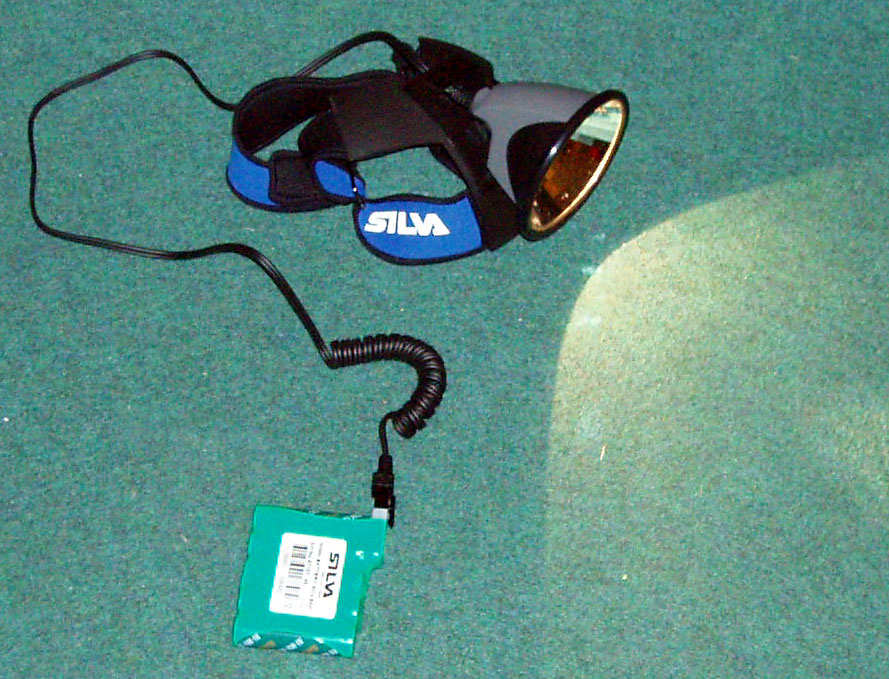 Orienteringspannlampa